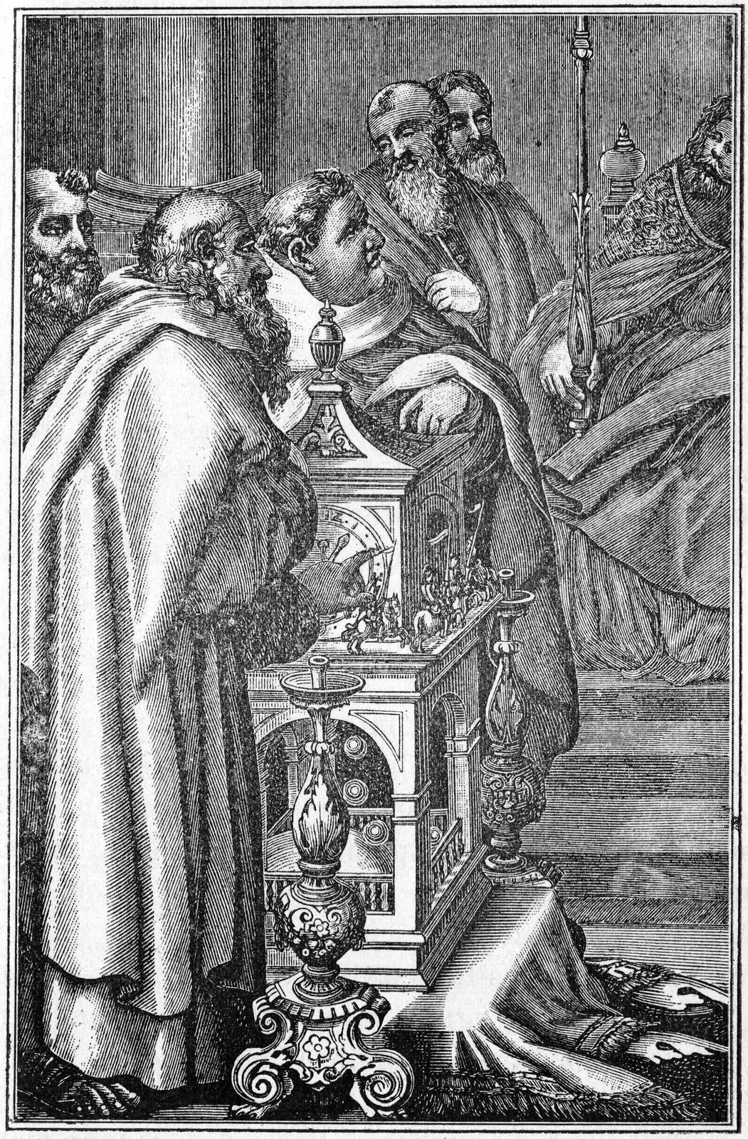 Der Kalif Harun al-Raschid schenkt Karl dem Großen eine Wasseruhr (um 800)